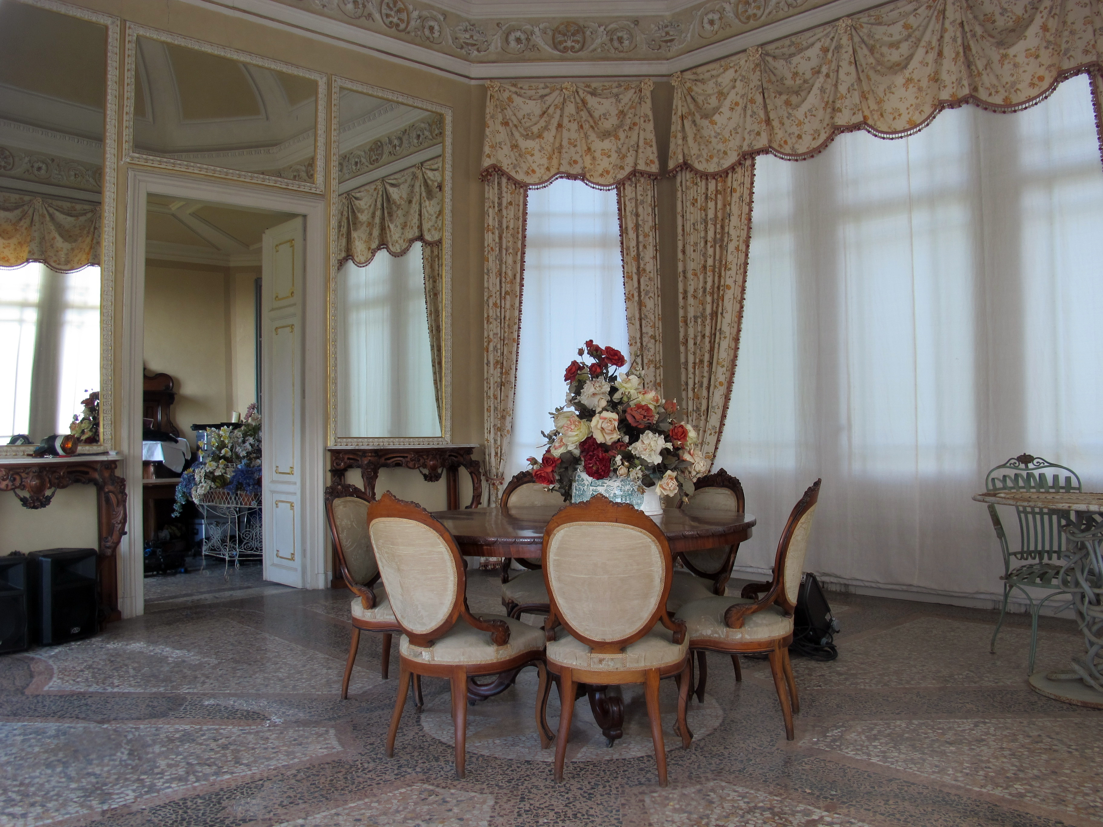 Villa La Petraia e dintorni, Firenze